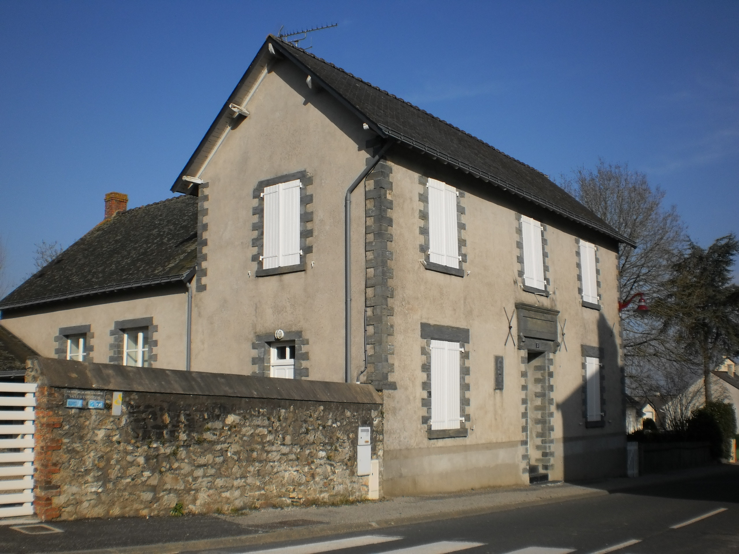 Louisfert (Loire-Atlantique, France) - maison de René-Guy Cadou